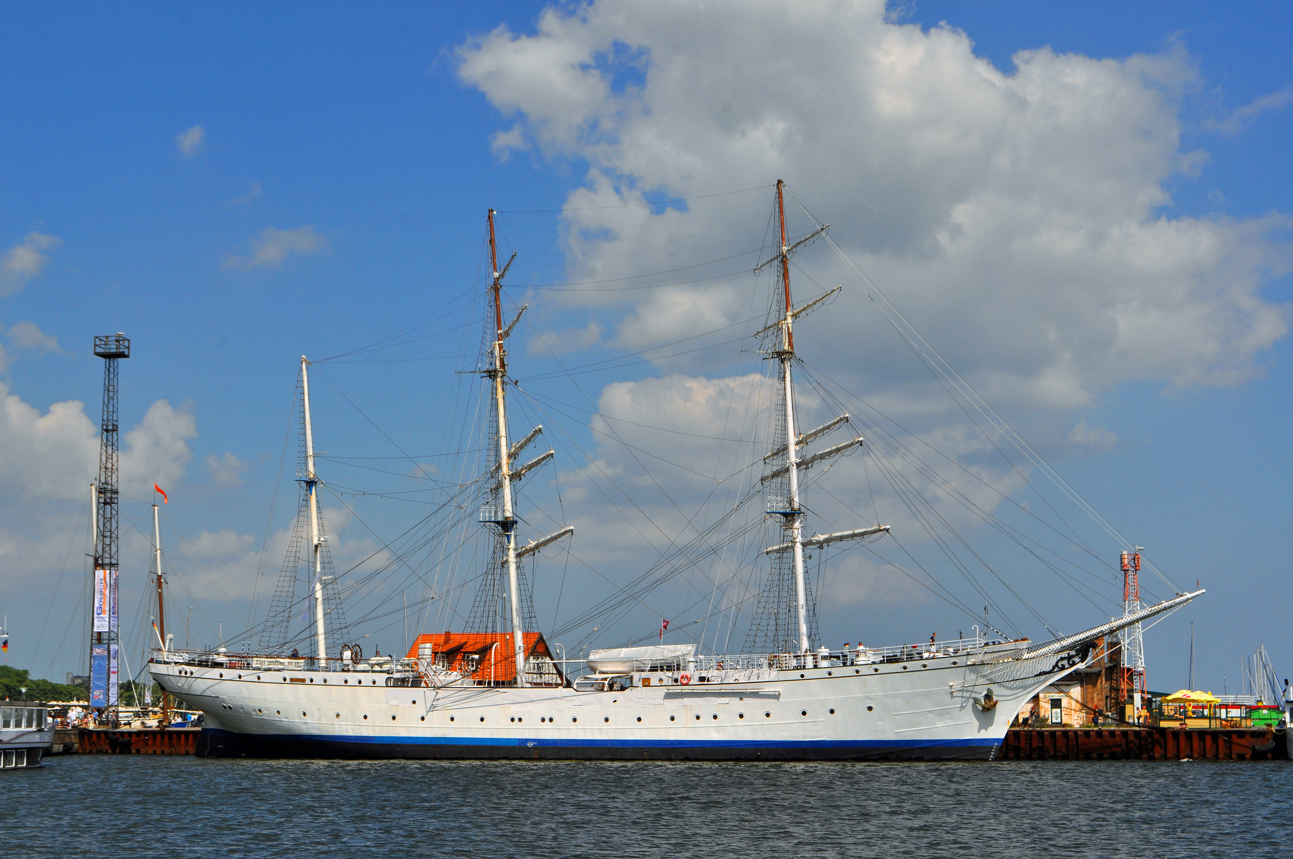 Die GORCH FOCK im Juni 2013 im Stralsunder Hafen, festgemacht an der so genannten "Ballastkiste".